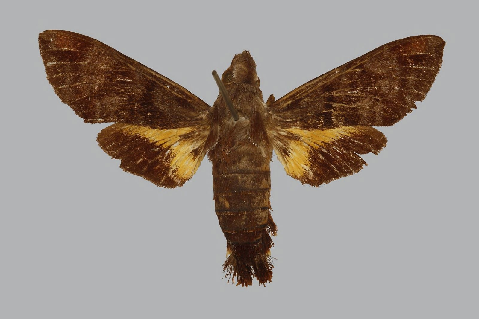 Macroglossum fruhstorferi fruhstorferi, female, upperside. Indonesia, Java, Pr.